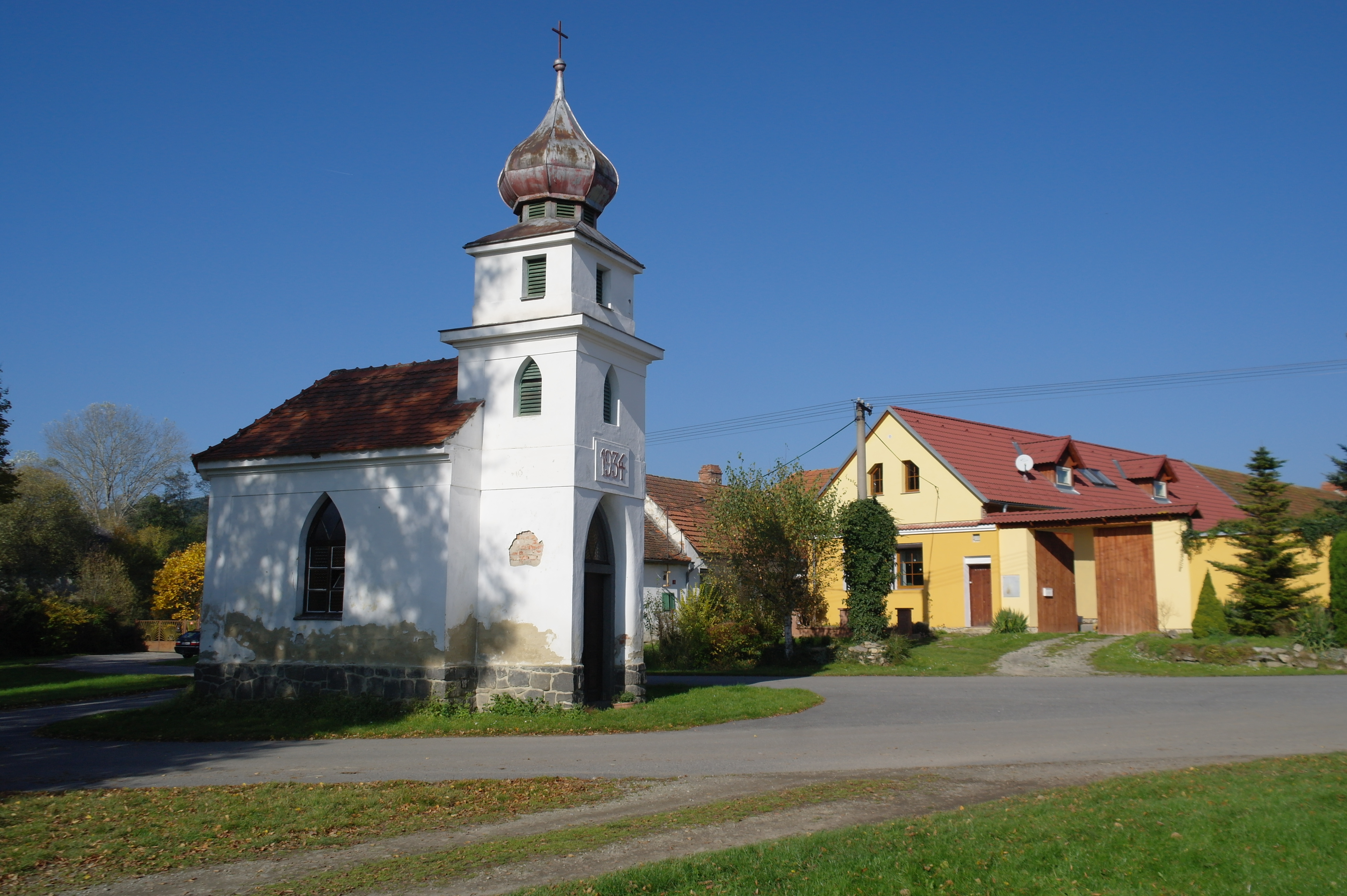 Vesnice Svinětice, náves s kaplí